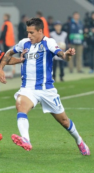 Крістіан Тельйо під час виступів за ФК Порту